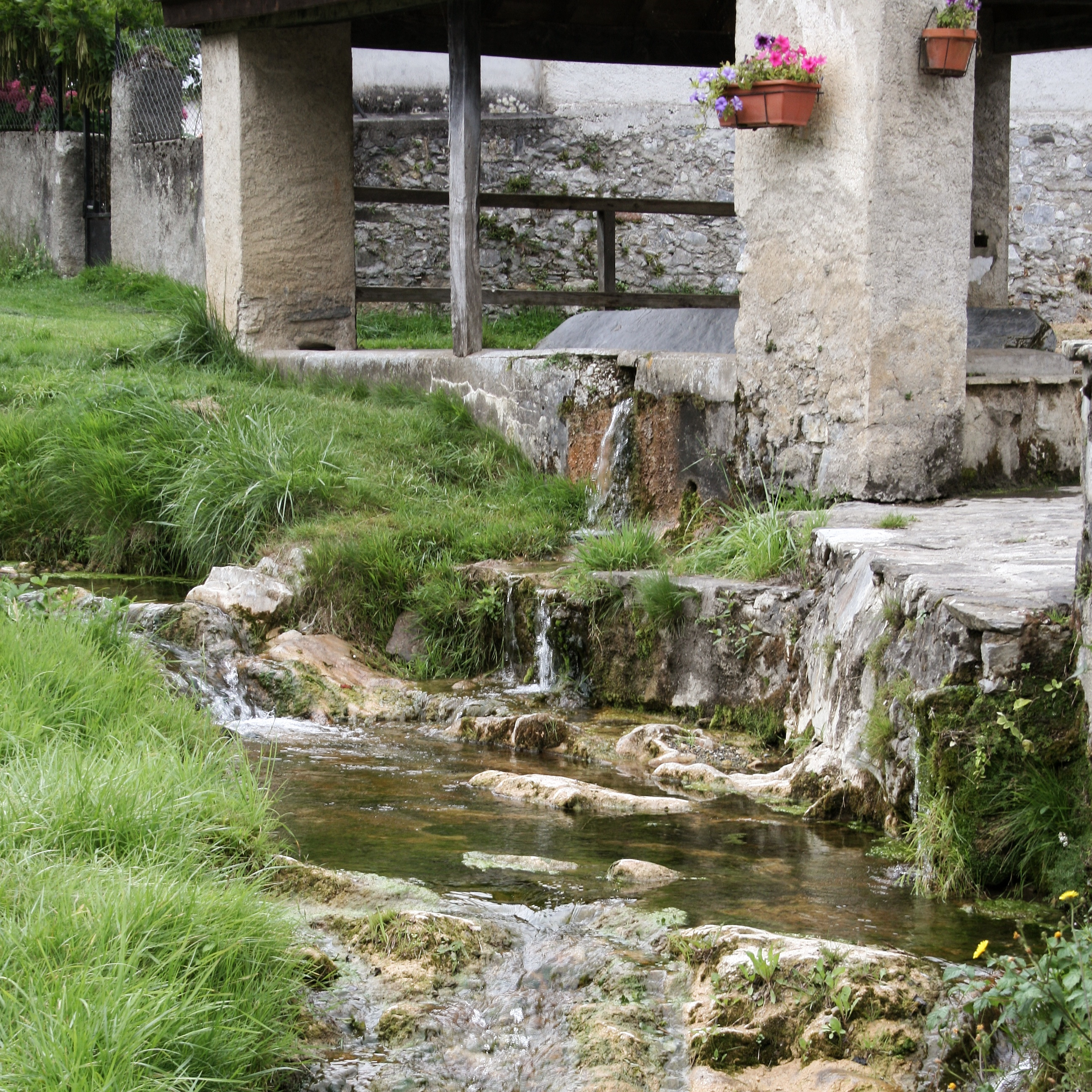 Ruisseau et lavoir dans le village de Beaudéan, dans les Hautes Pyrénées